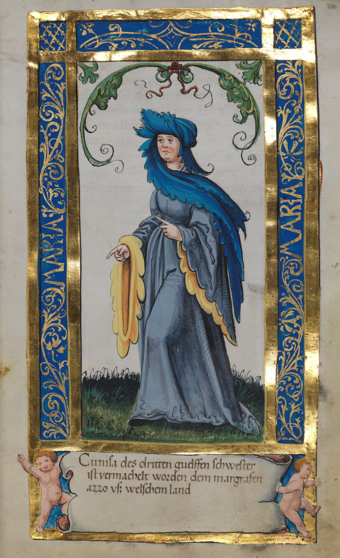 Weingartener Stifterbüchlein, Württembergische Landesbibliothek Stuttgart, Cod.hist.qt.584, fol. 24r, Stifterbild Cunniza (Kunigunde), Schwester Welf III. Cunisa des dritten guelffen schwester ist vermachelt worden dem margrafen azzo vß welschem land